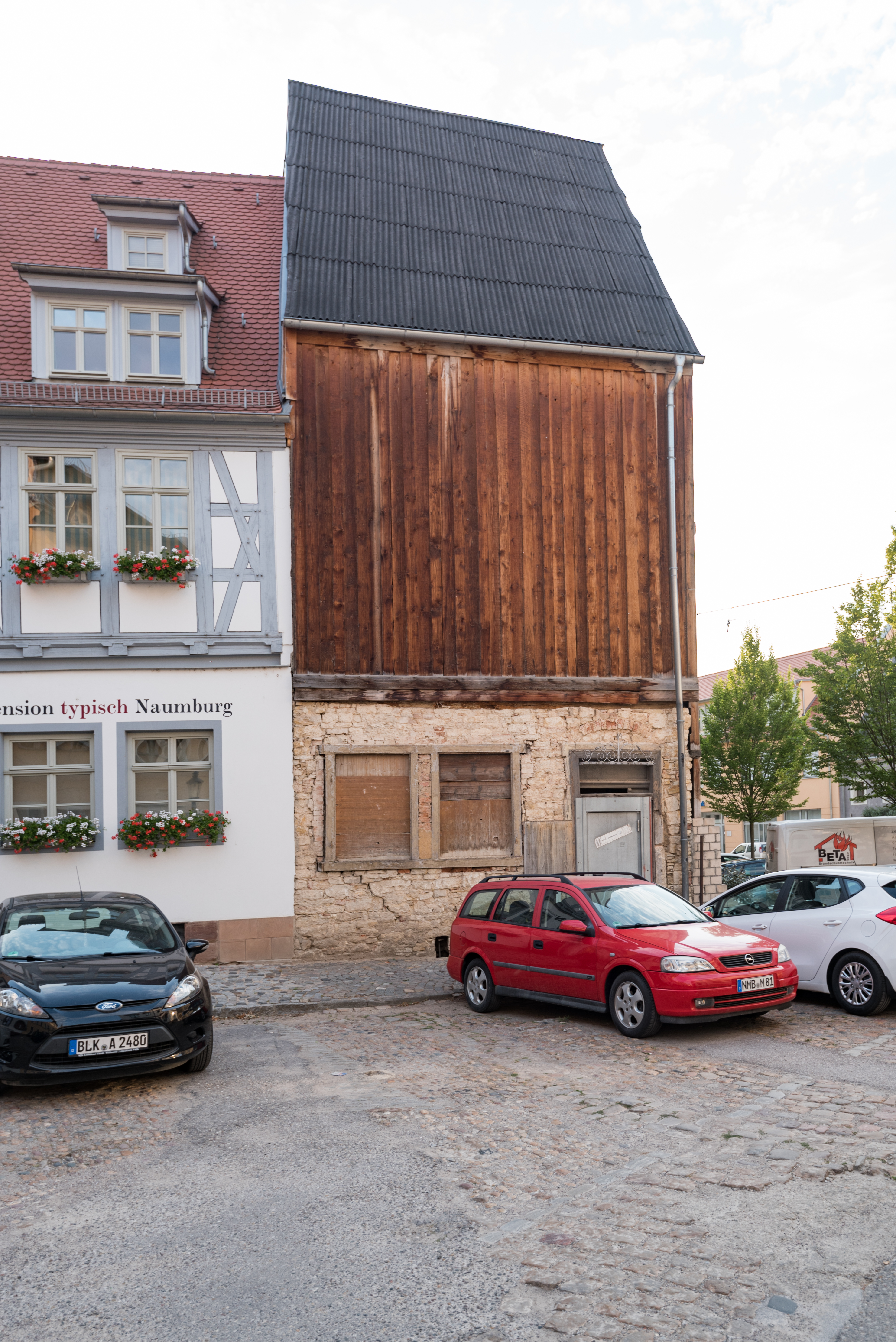 Naumburg (Saale), Reußenplatz 9